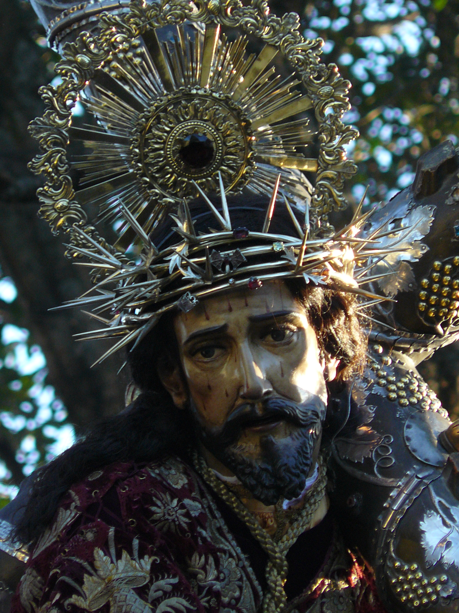 Consagrada imagen de Jesús Nazareno de la Merced en su procesión del viernes santo 21 de marzo de 2008